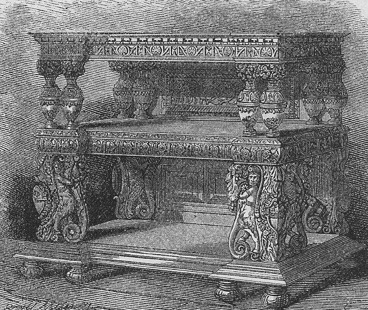 Jacobean court-cupboard.